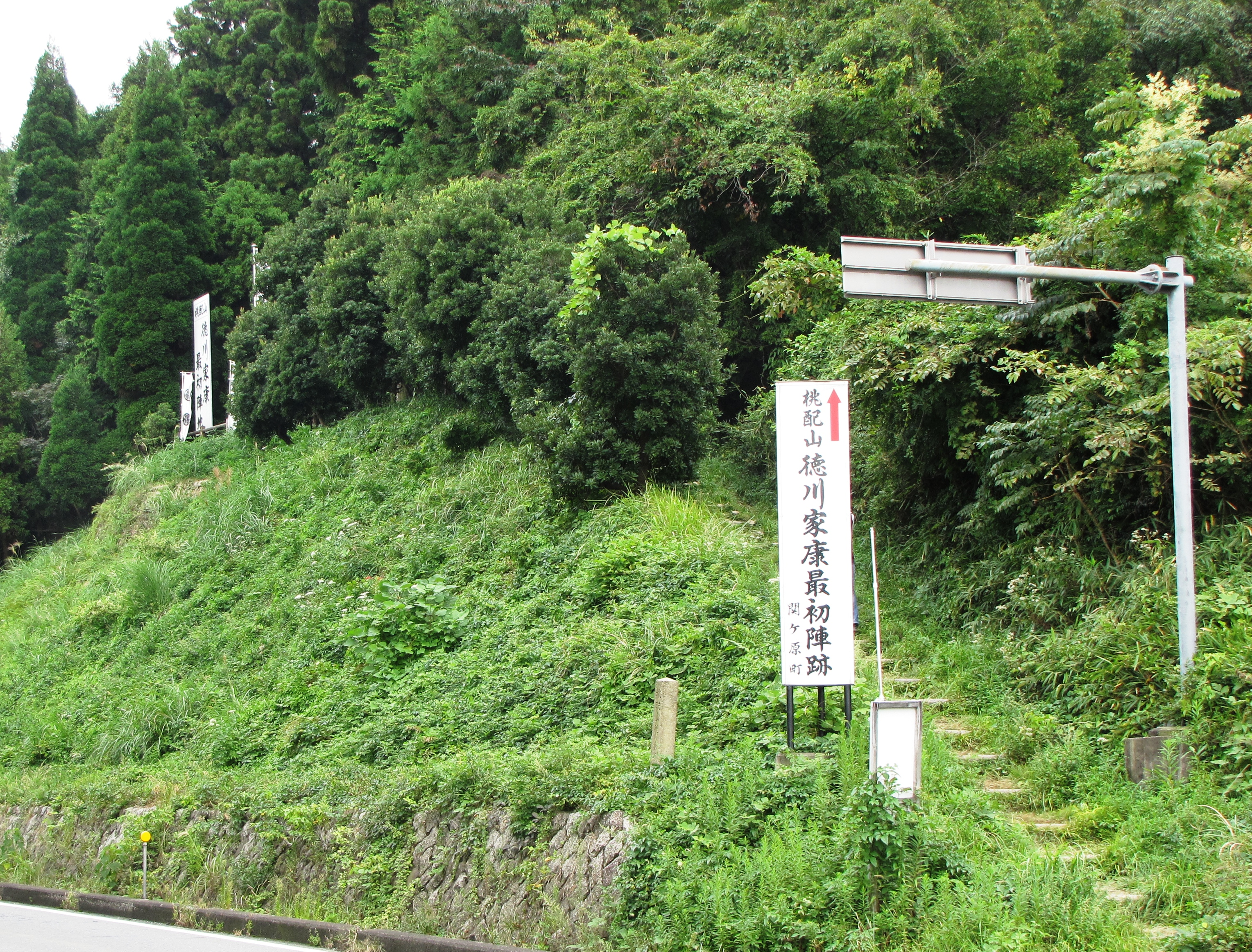 岐阜県関ケ原町の桃配山（ももくばり）。史跡「徳川家康最初陣跡」がある。